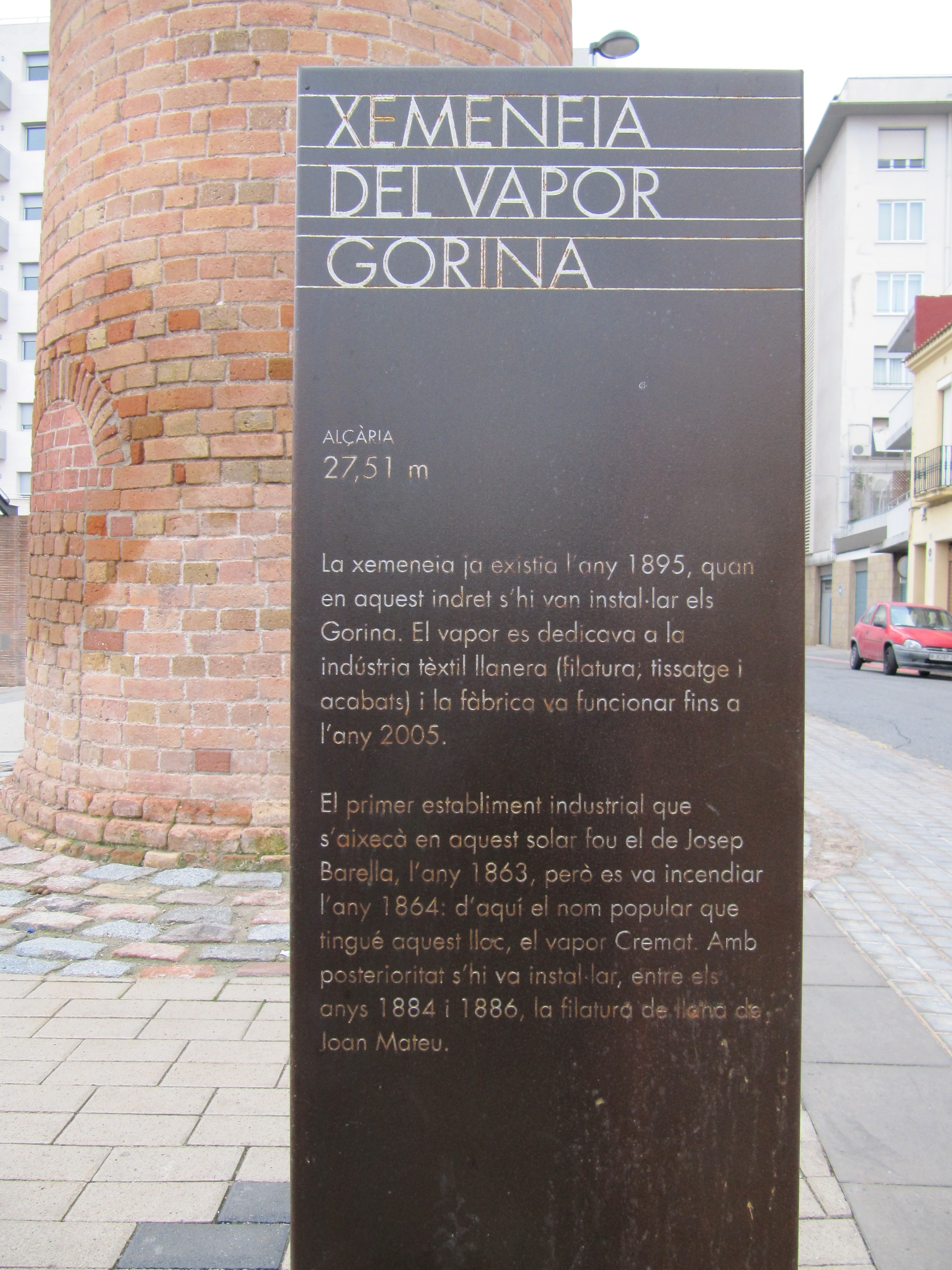 Placa informativa de la xemeneia del Vapor Gorina (Sabadell, Vallès Occidental).